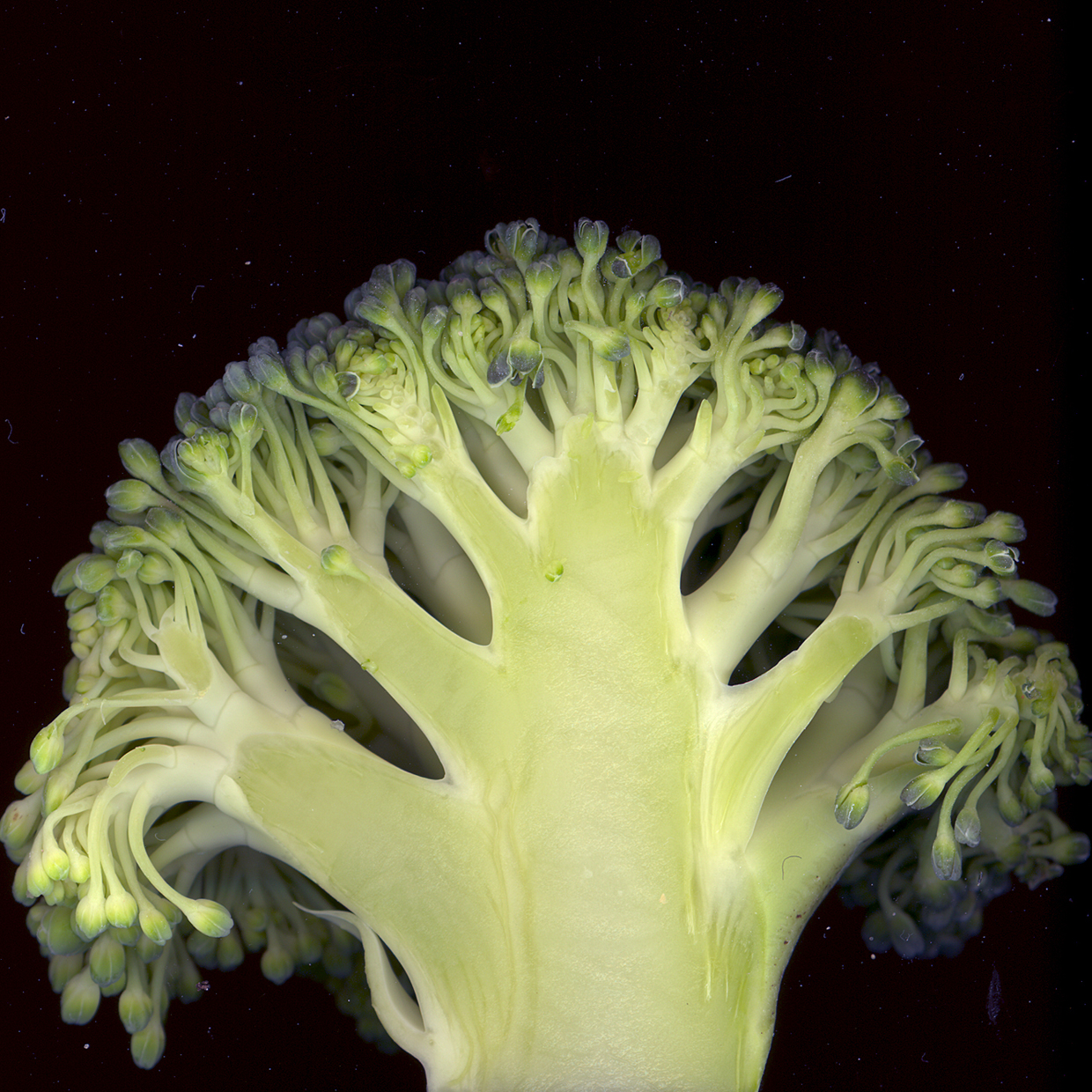 Coupe longitudinale d'une inflorescence comestible de Brocoli (Brassica oleraces var cauliflora ou italica)